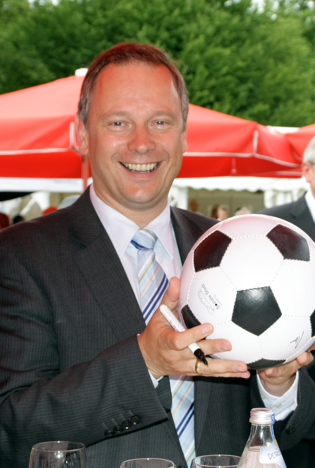 Georg Fahrenschon, deutscher Politiker (CSU) - und offensichtlich auch Fußballfan.